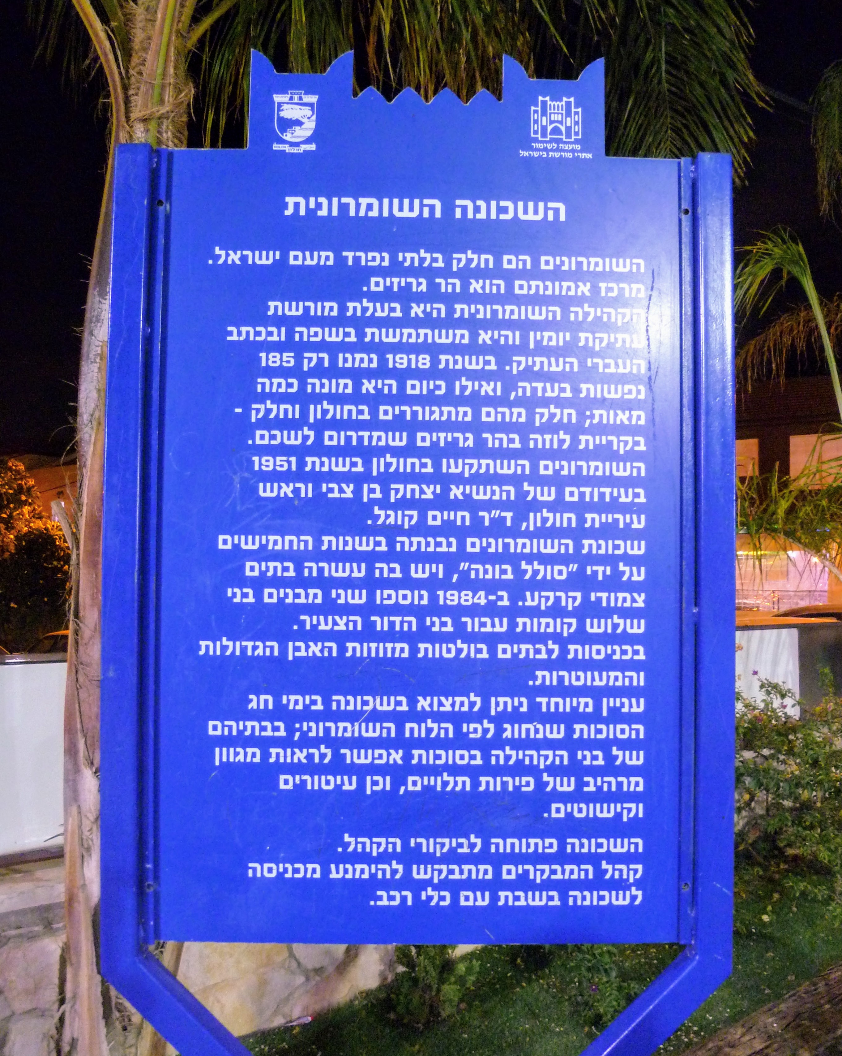 שלט בכניסה לשכונה השומרונית ליד בית הכנסת השומרוני בחולון